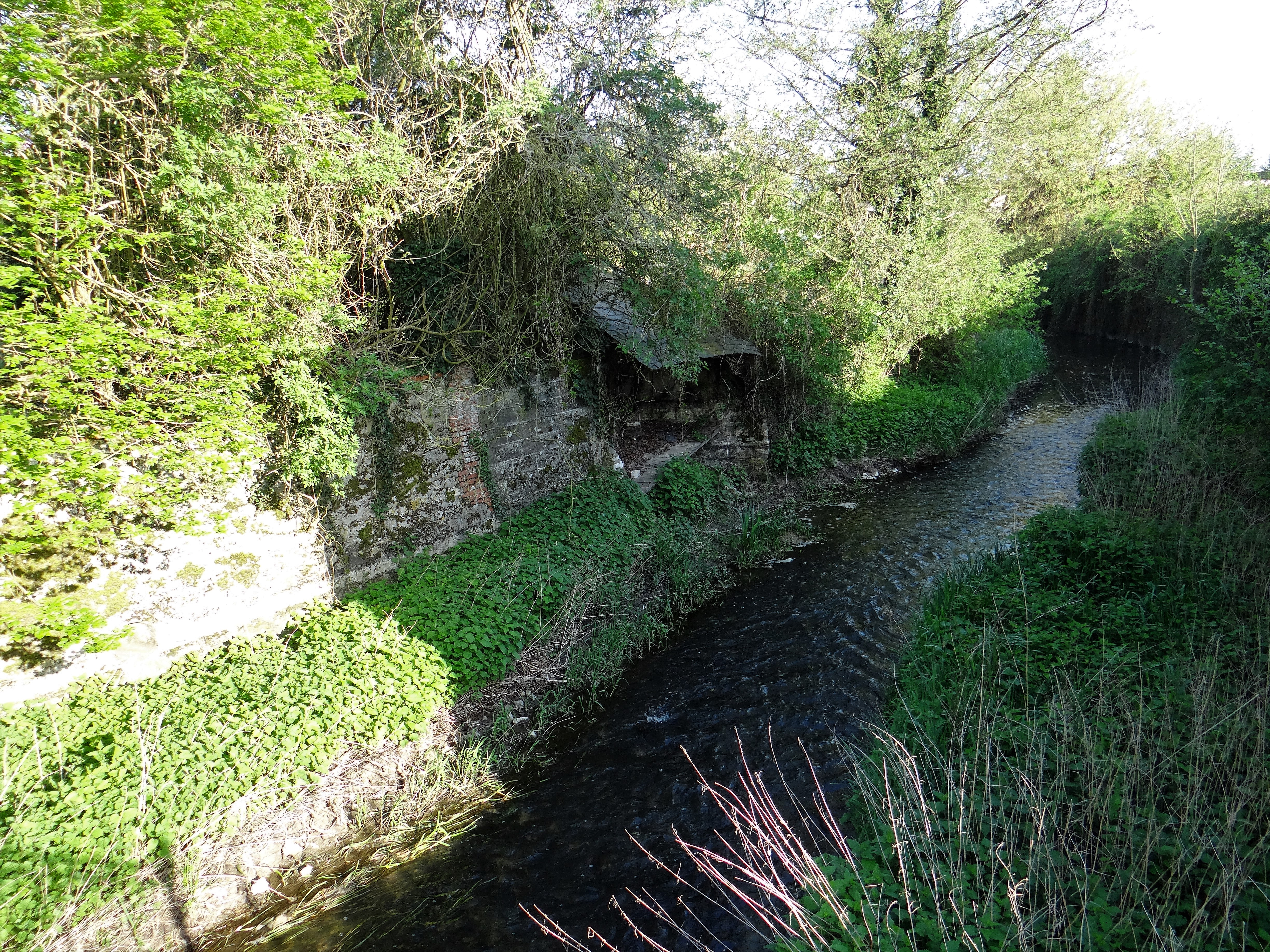 La Bézonde à Ladon (Loiret), France.